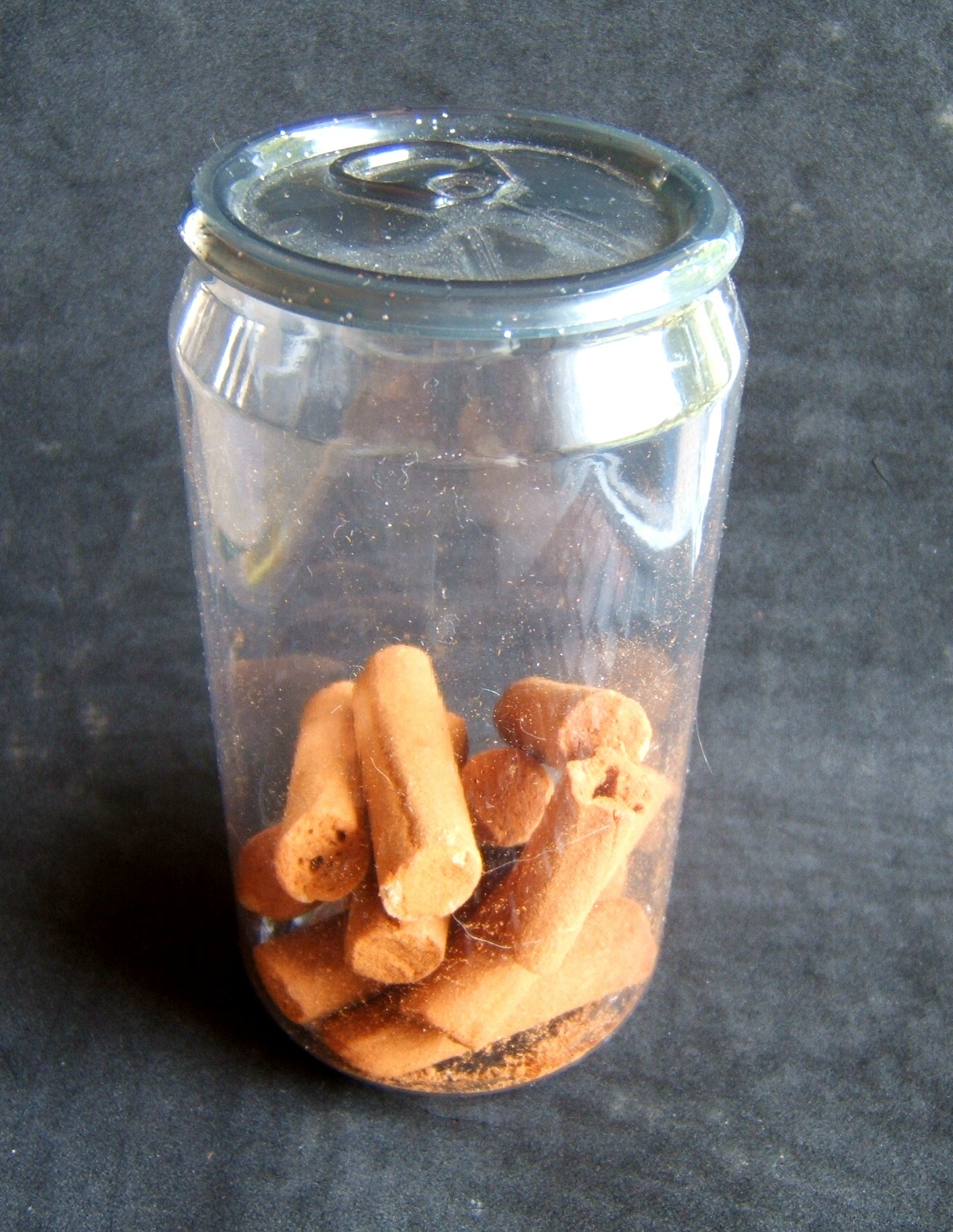 Blikje" uitgevoerd in plastic, gevuld met kaneelstokjes.